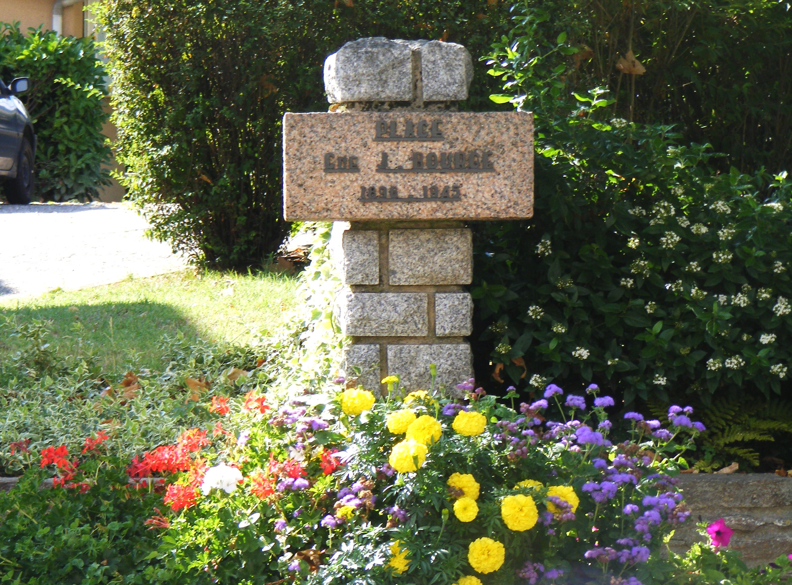 Stèle commémorative Résitance